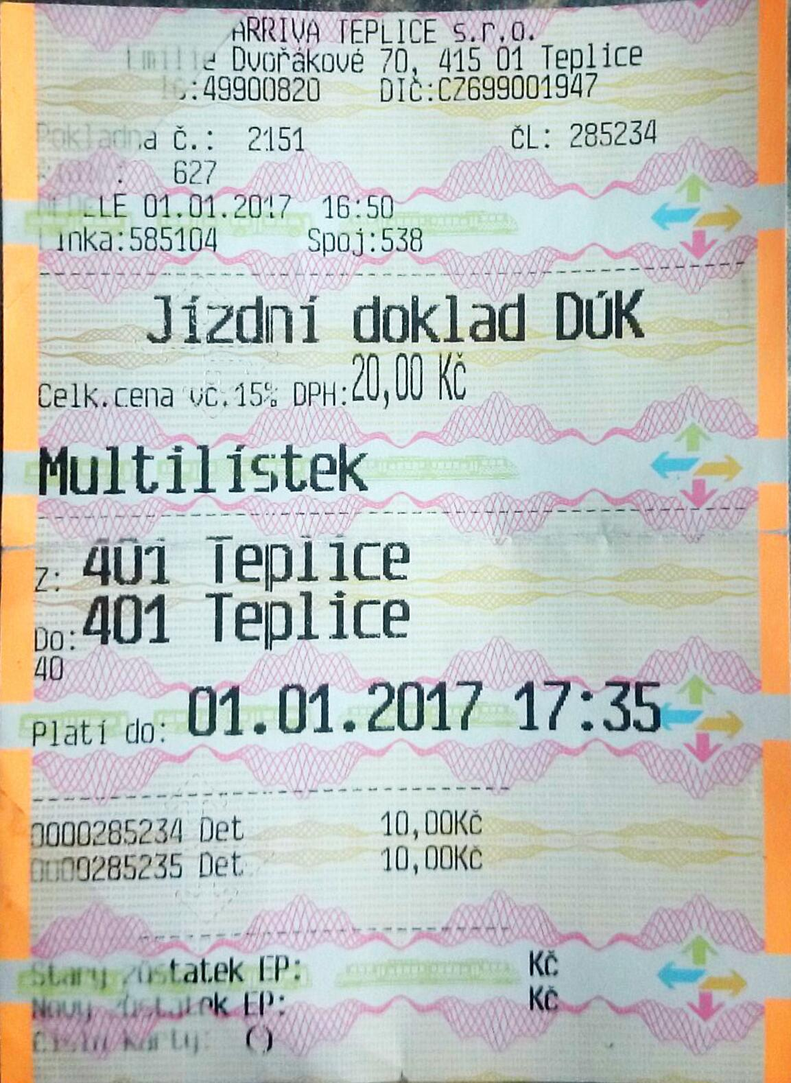 Jízdenka Dopravy Ústeckého kraje v pásmu 401 - v Teplicích